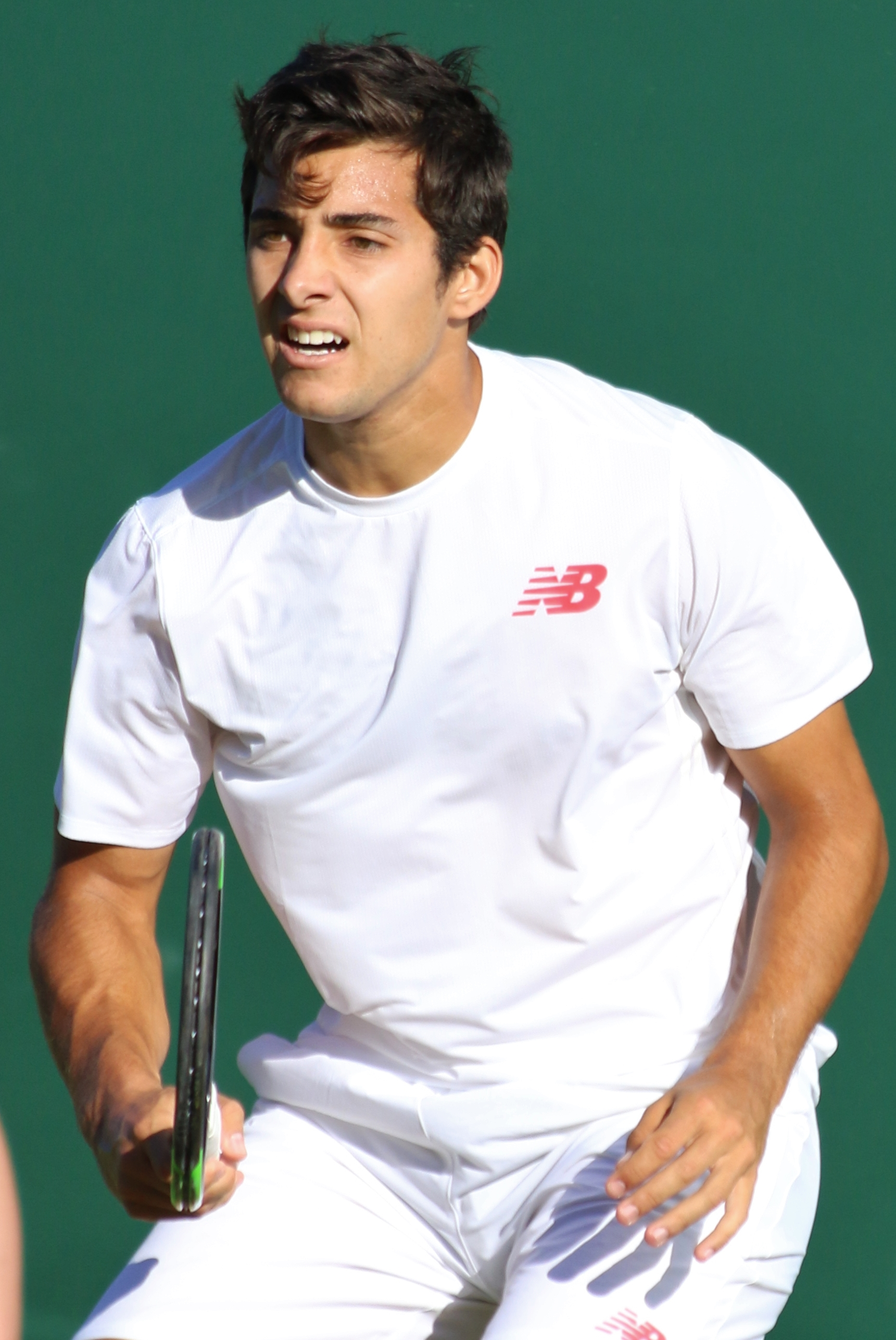 Garin WM18 (16)